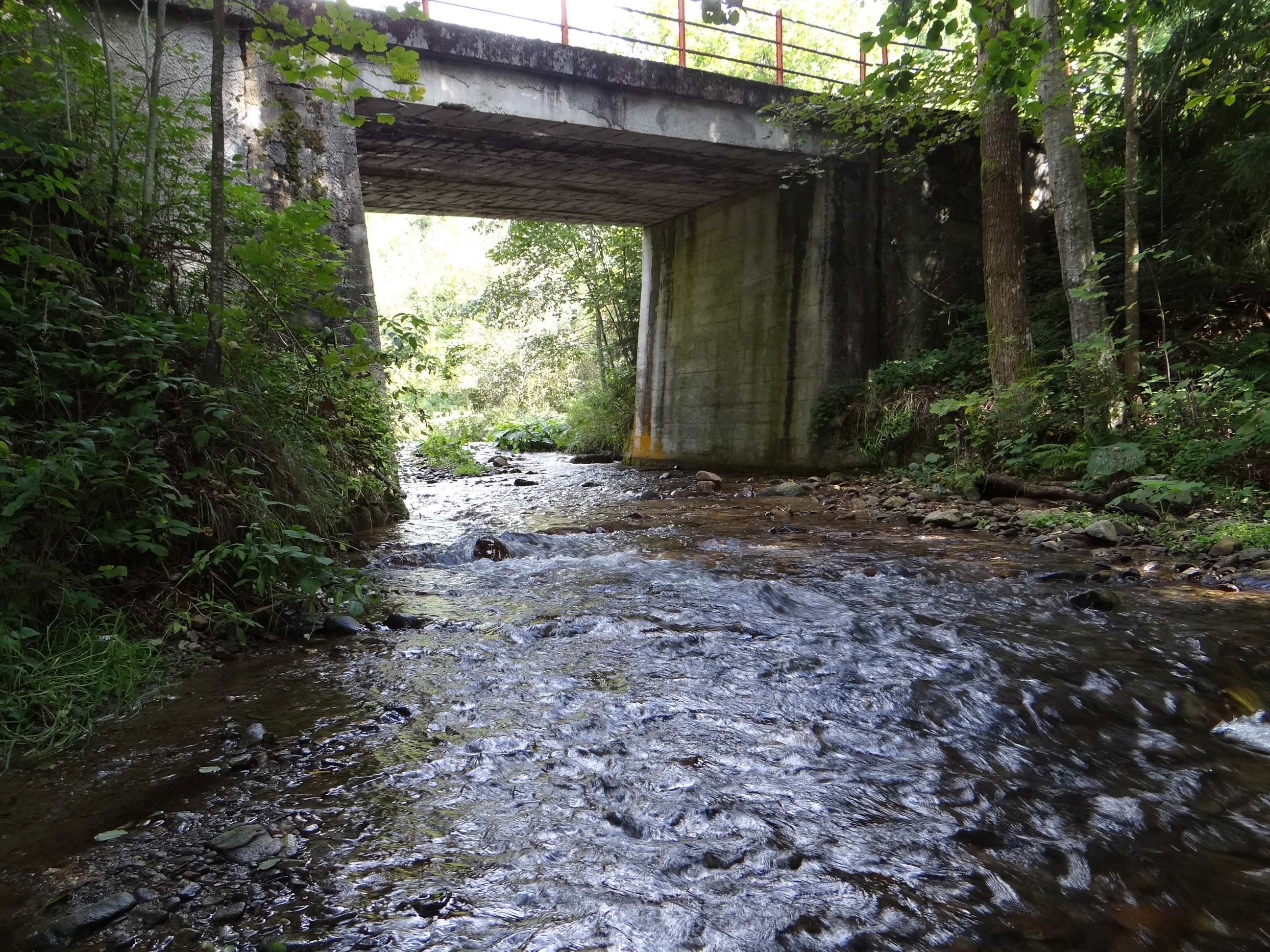 Štiavnička in Jarabá